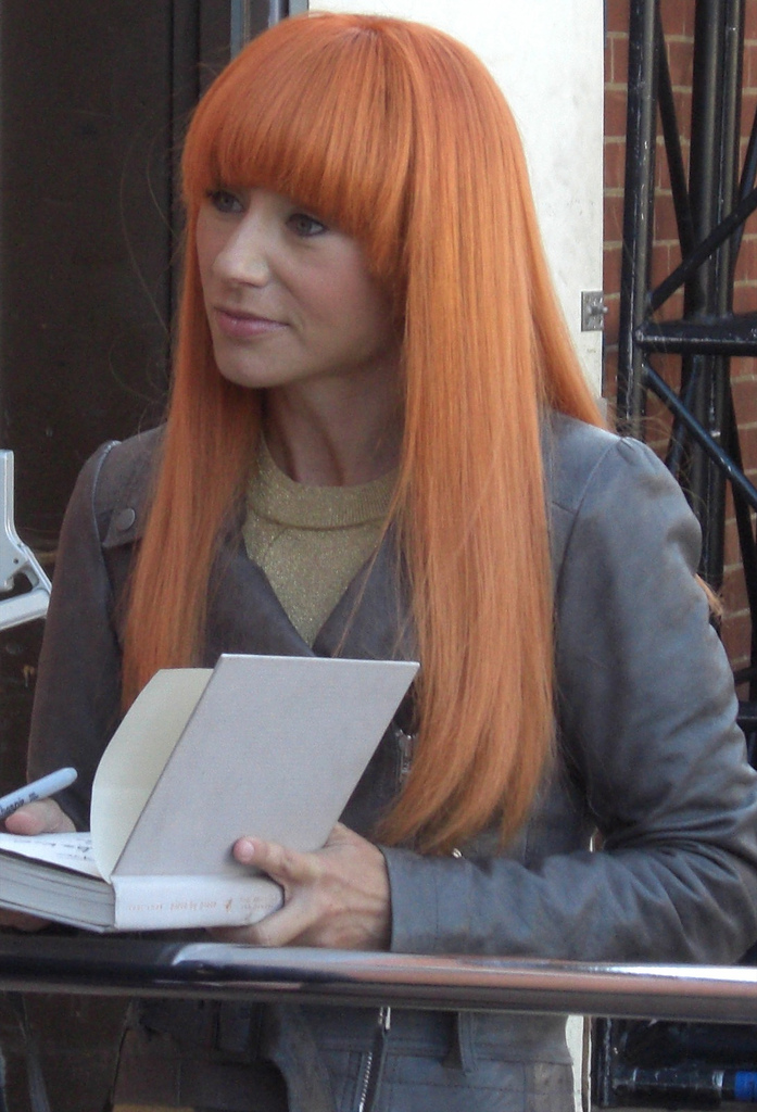 Tori Amos